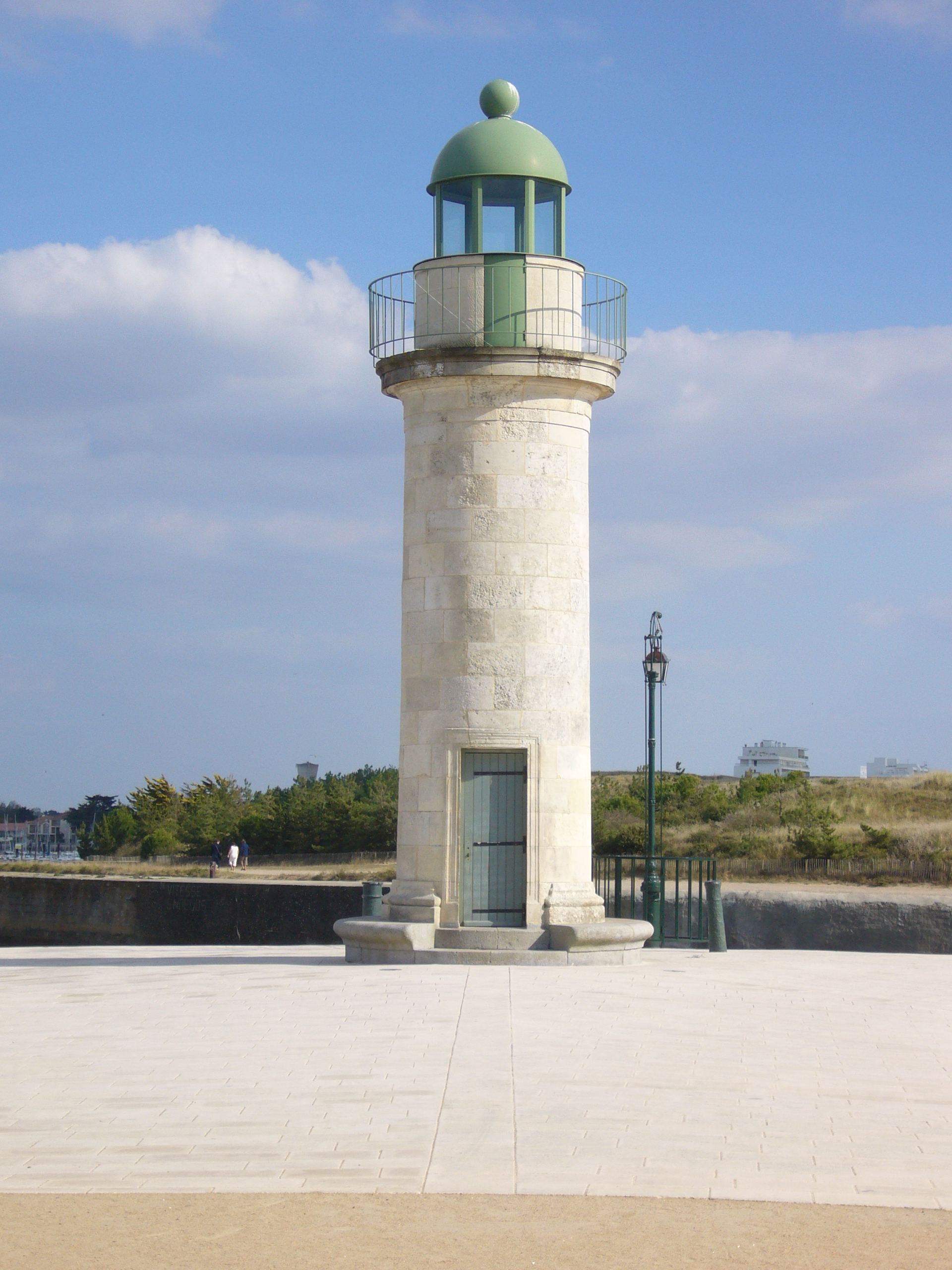 Saint-Gilles-Croix-de-Vie dans le département de la Vendée (France) : La Tour Joséphine côté Croix-de-Vie en septembre 2007.